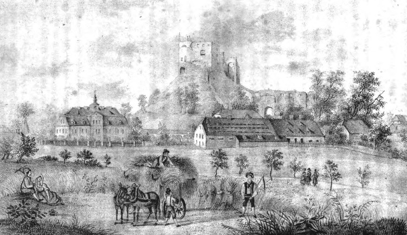 Burgruine Greiffenstein in Schlesien